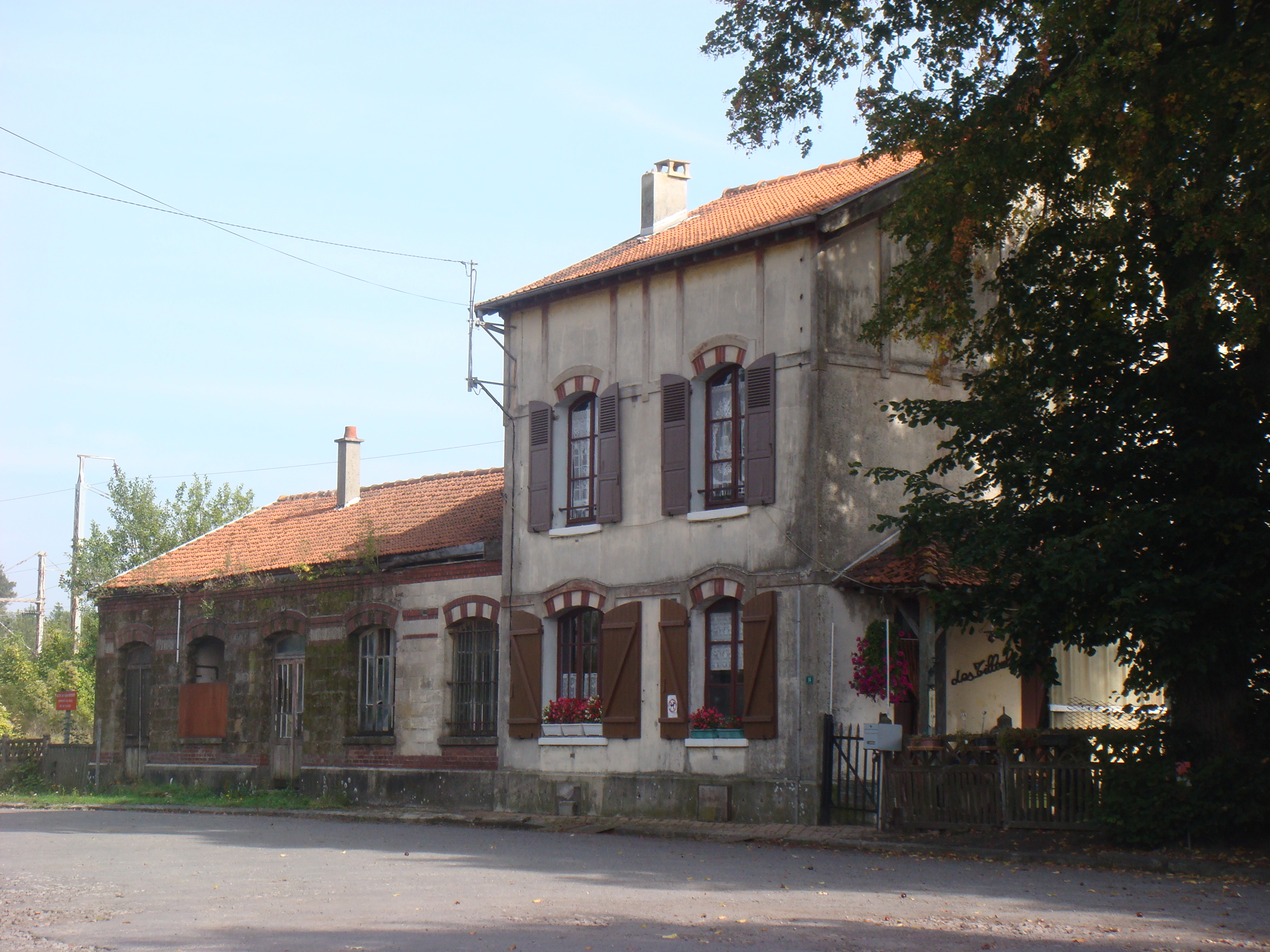 Gare de Miraumont, Somme, France, en 2013.